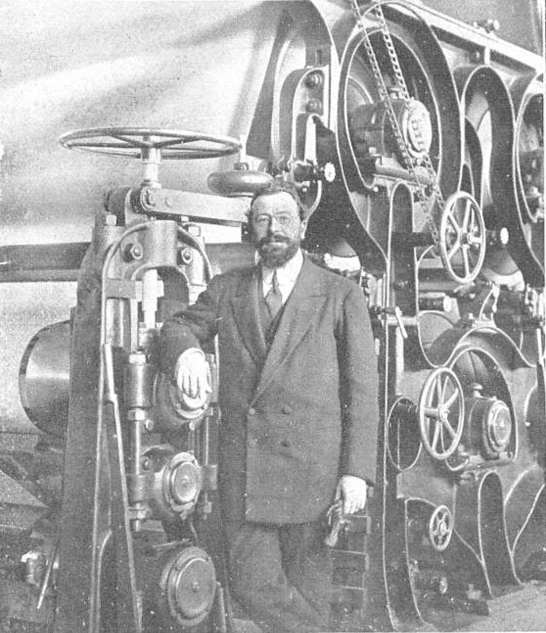 Nicolás de Urgoiti, ilustrado ingeniero, director gerente de la Papelera Española.